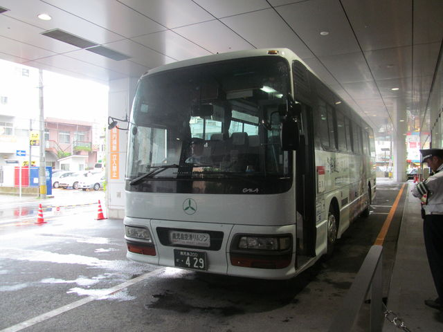 南国交通バスターミナル 鹿児島空港行き バス いわさきネットワーク担当便